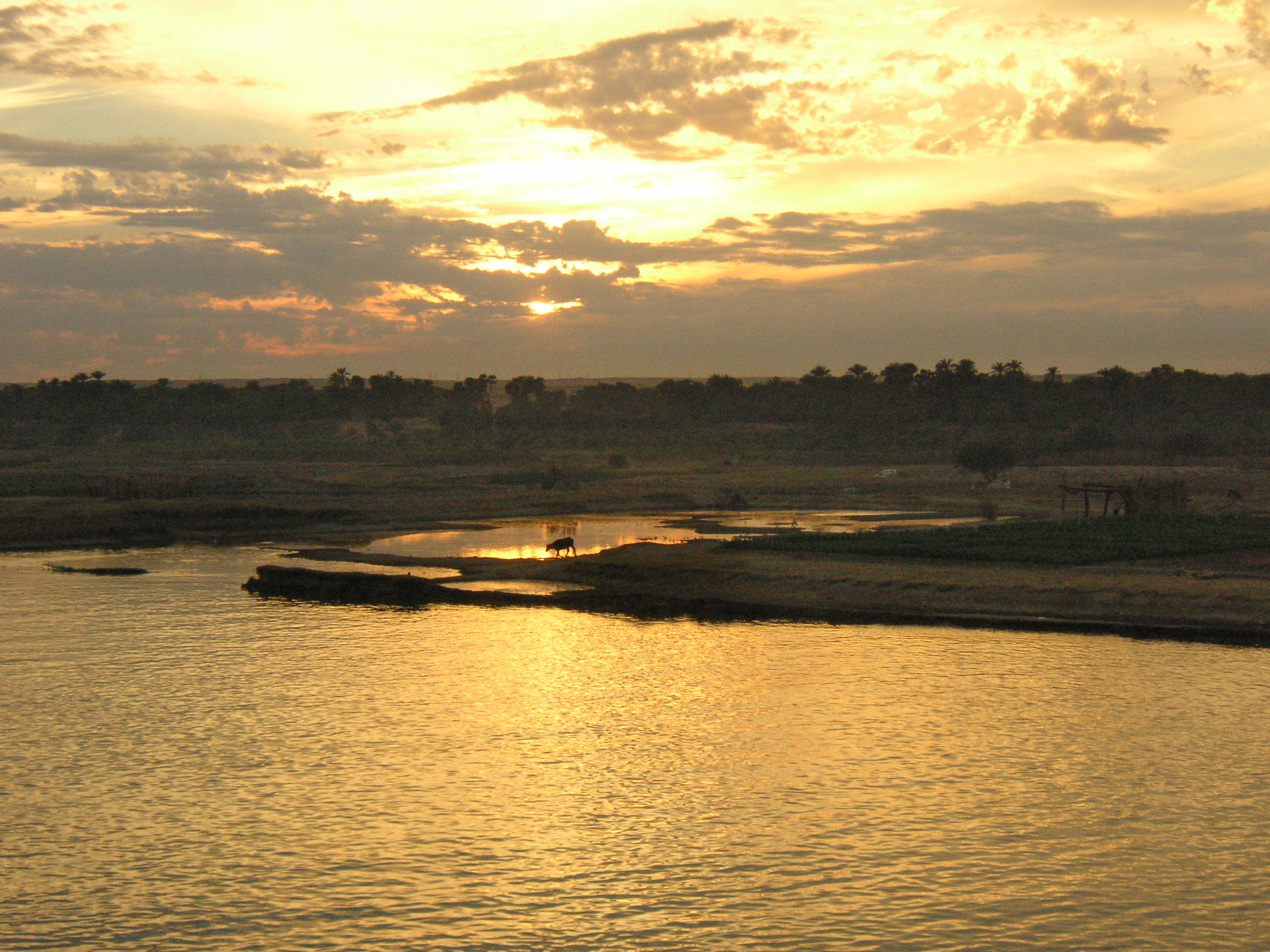 Nile River, Egypt.